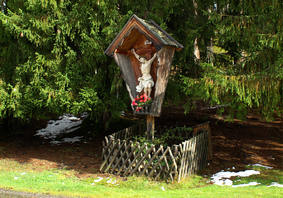 Kruzifix